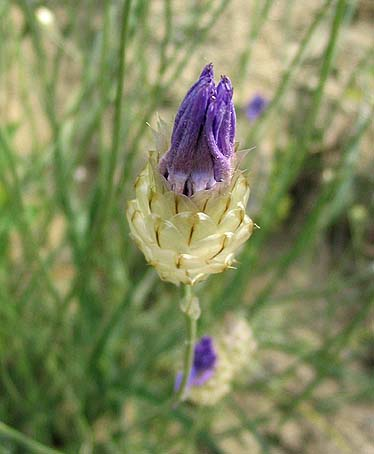 Catananche caerulea (catananche bleue) Photo prise à Pézilla-de-Conflent en juin 2004 Jean Tosti 2005